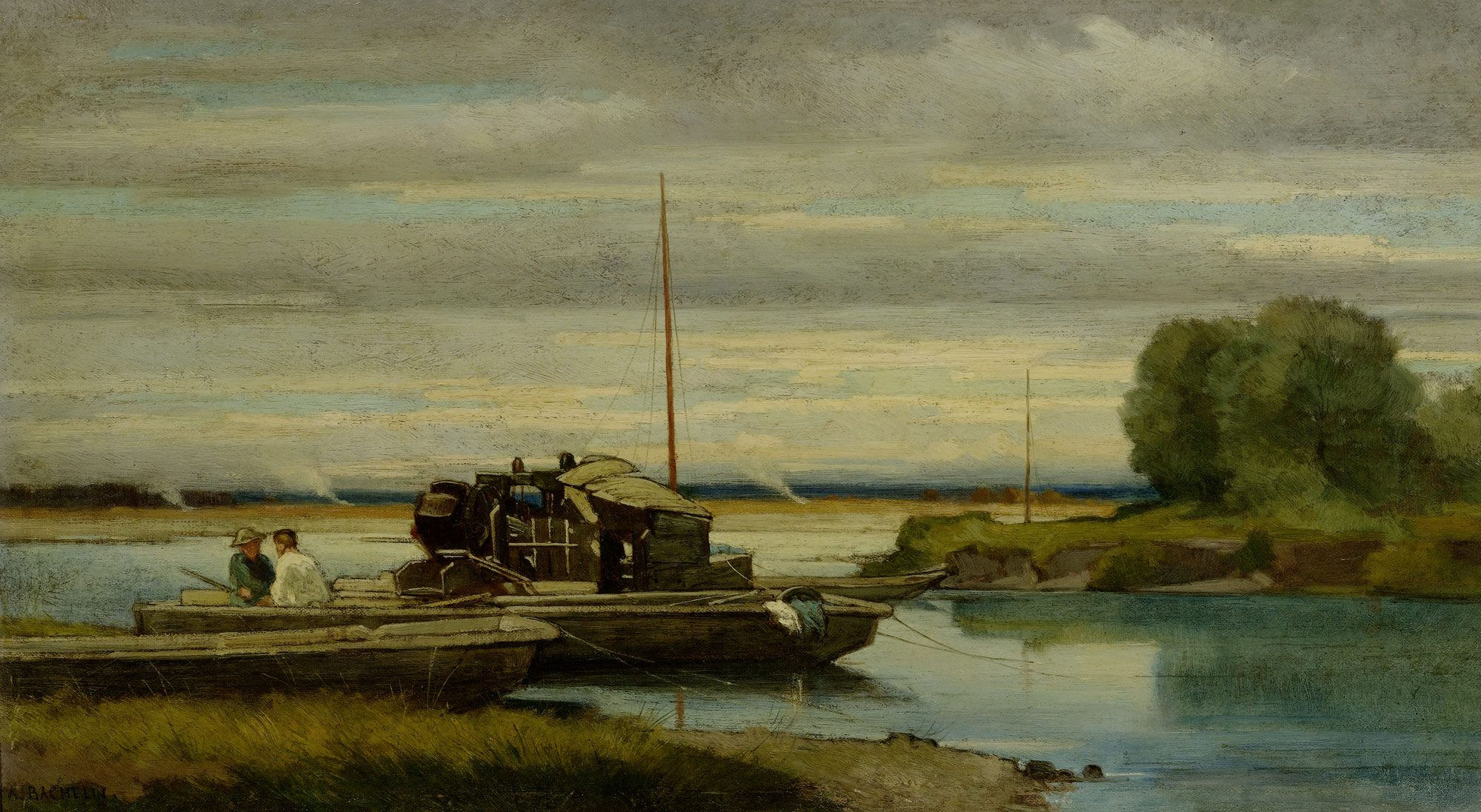 Bateau sur la Thièle. Huile sur toile. Signé A. BACHELIN en bas à gauche. 33x54 cm.